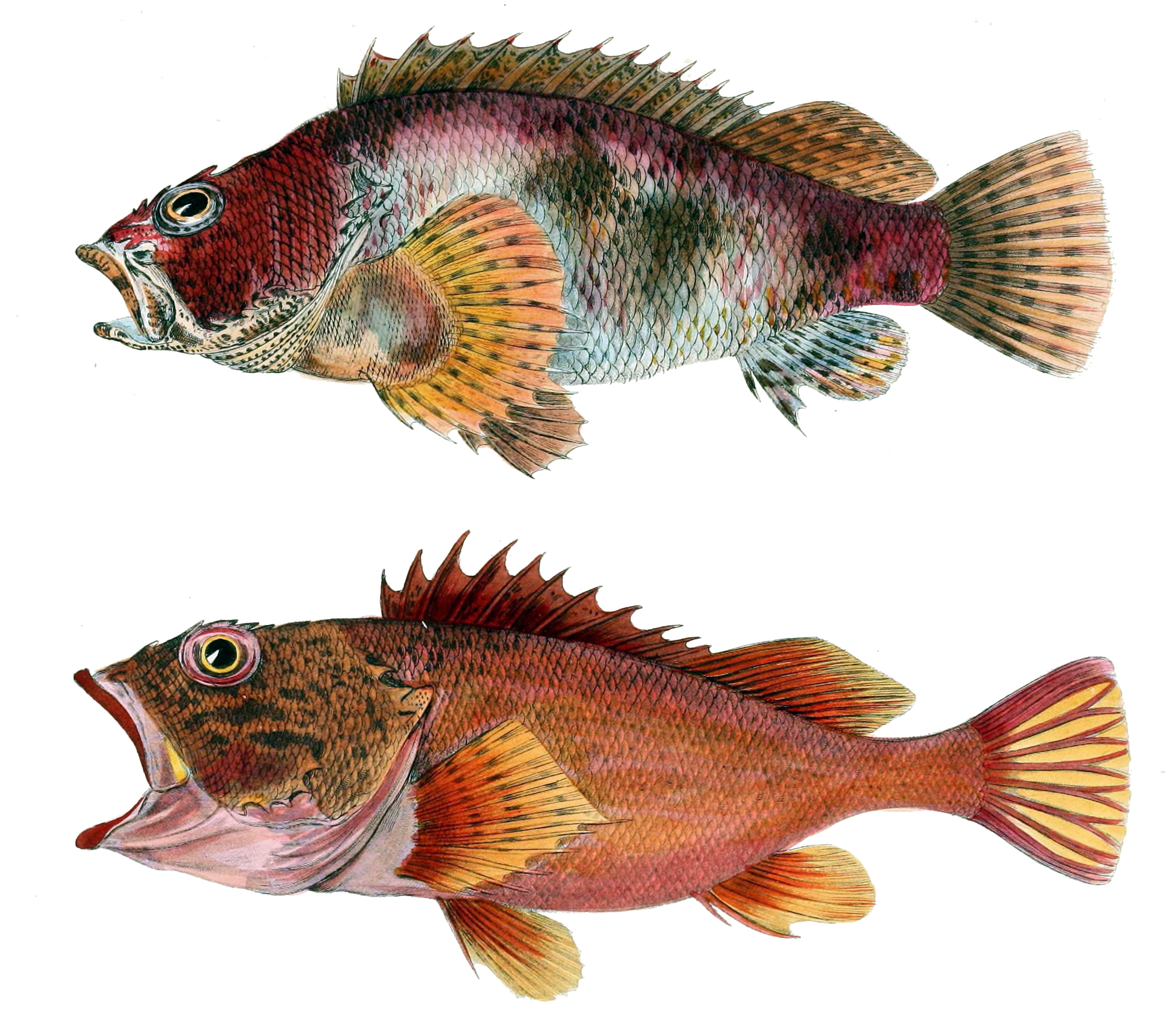 Sebastiscus marmoratus